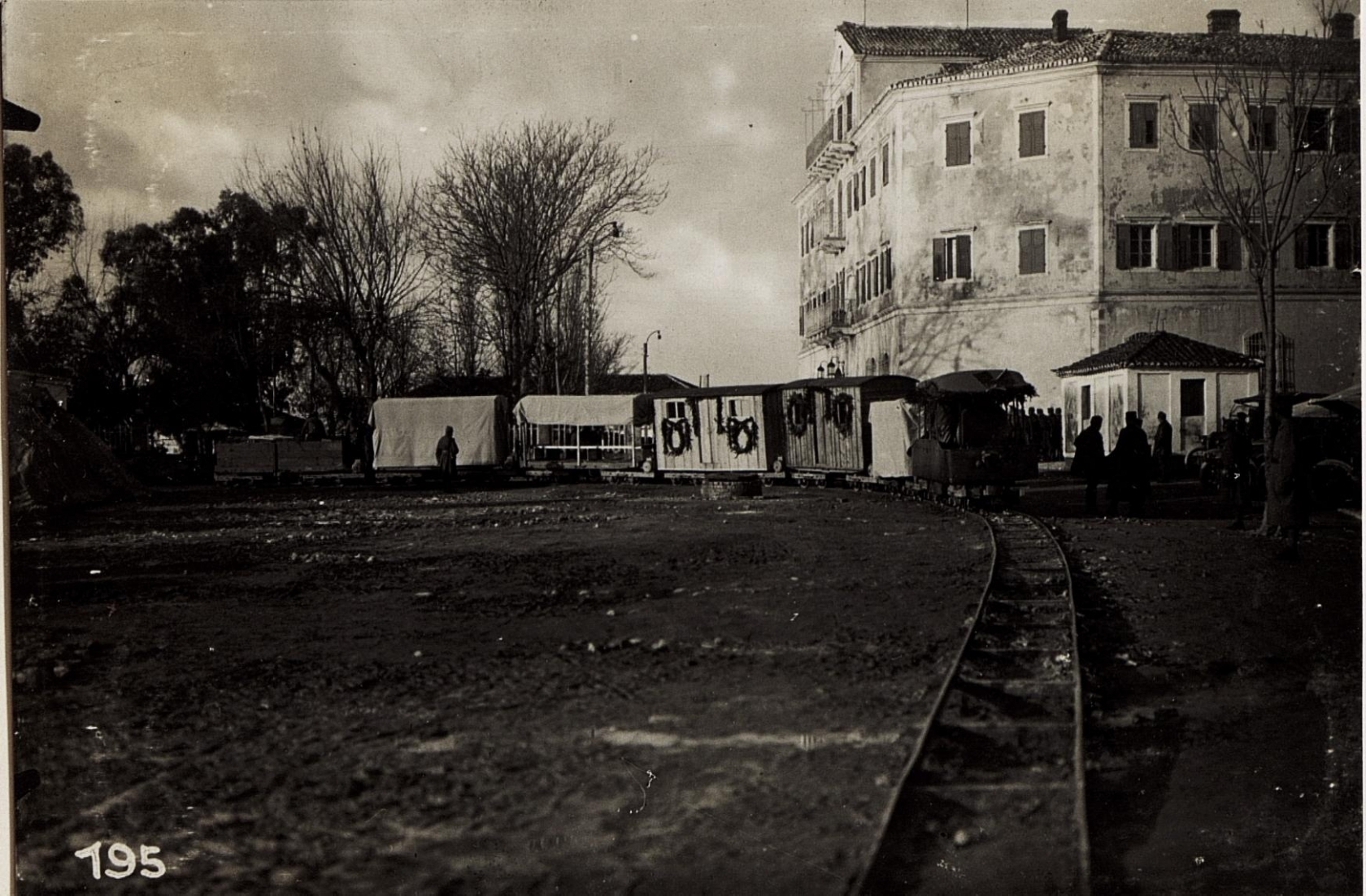 Abfahrt der Motorbahn von Durazzo nach Pekinj.